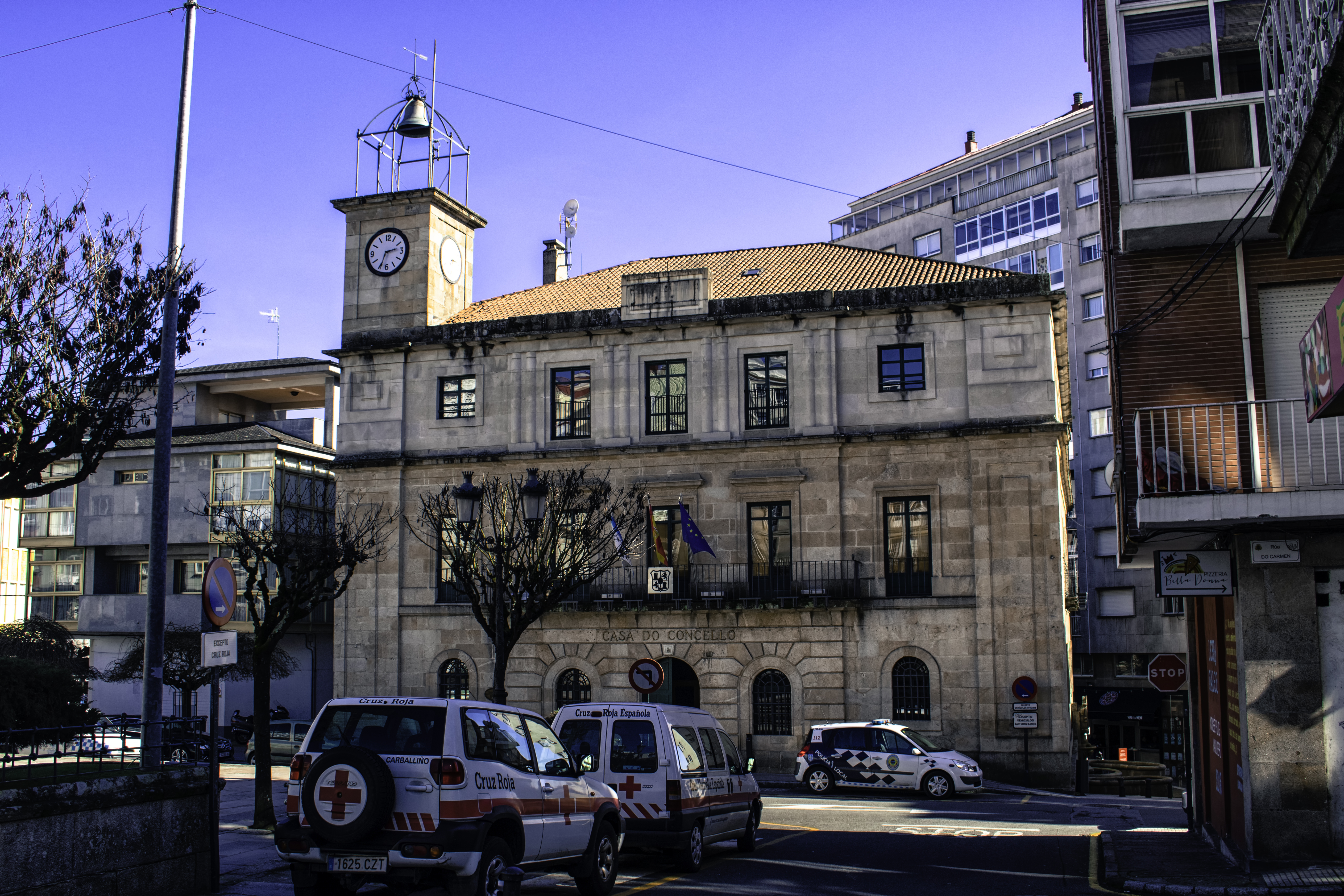 Casa do concello do Carballiño.